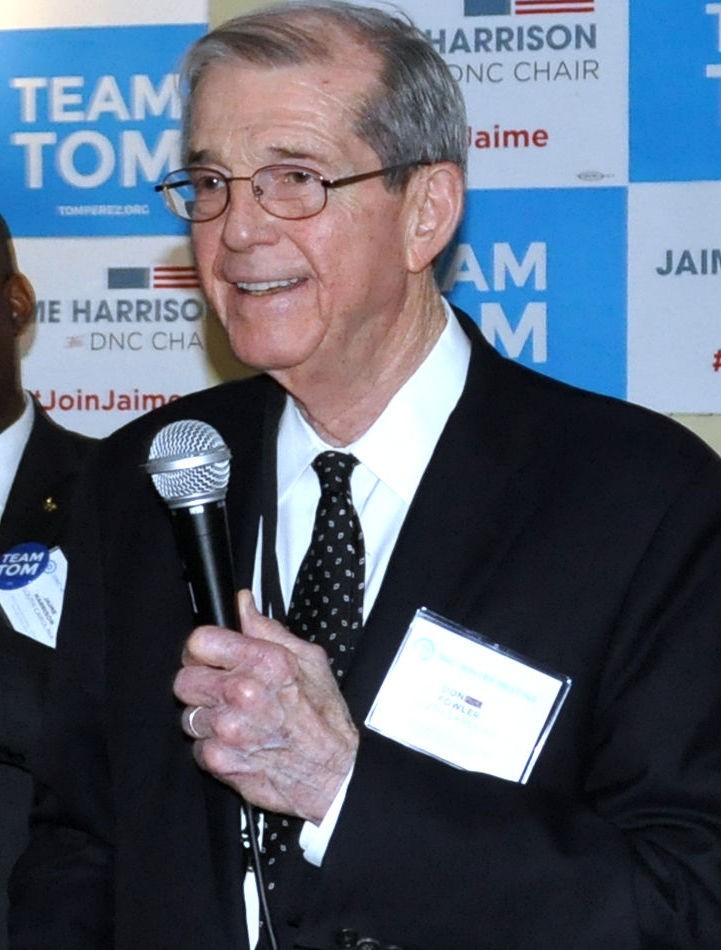 DNC Winter Meet 0484 Don Fowler - Jamie Harrison